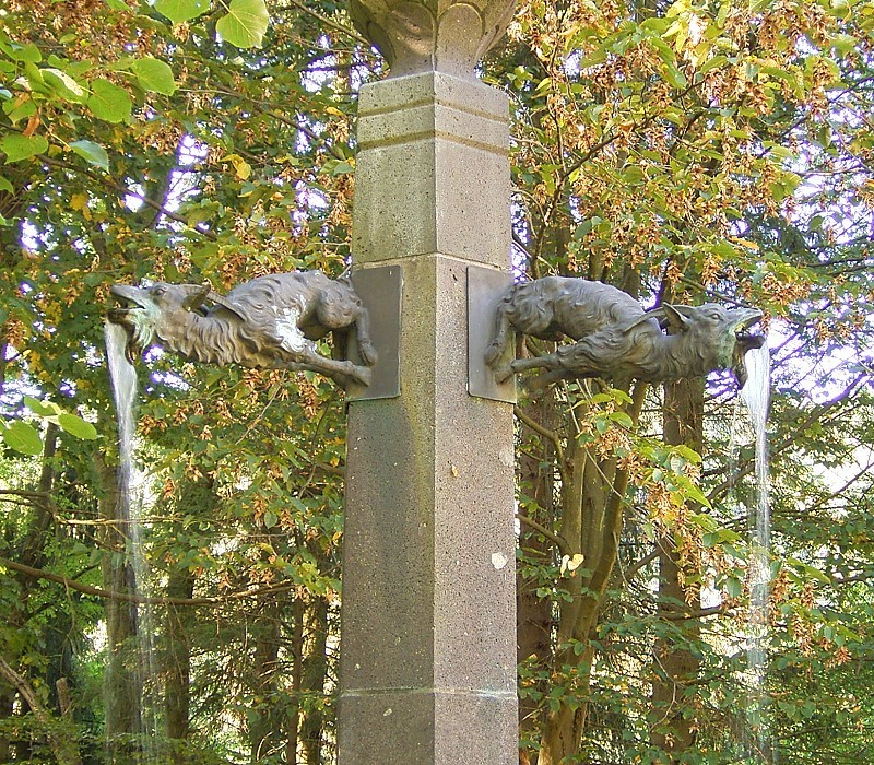 Wuppertal-Beyenburg